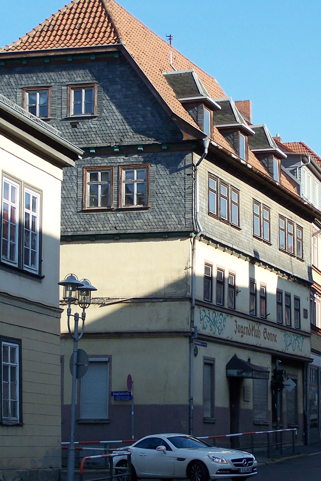 Das ehemalige Wirtshaus Zur Sonne in der Georgenstraße in der Eisenacher Altstadt.